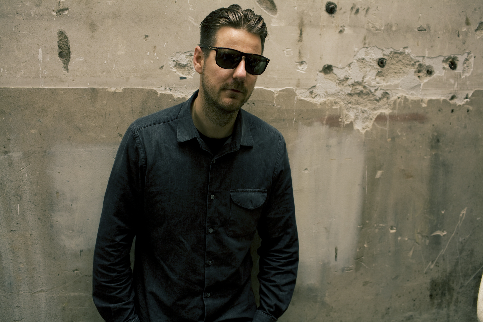 Nederlands muzikant Vieze Fur